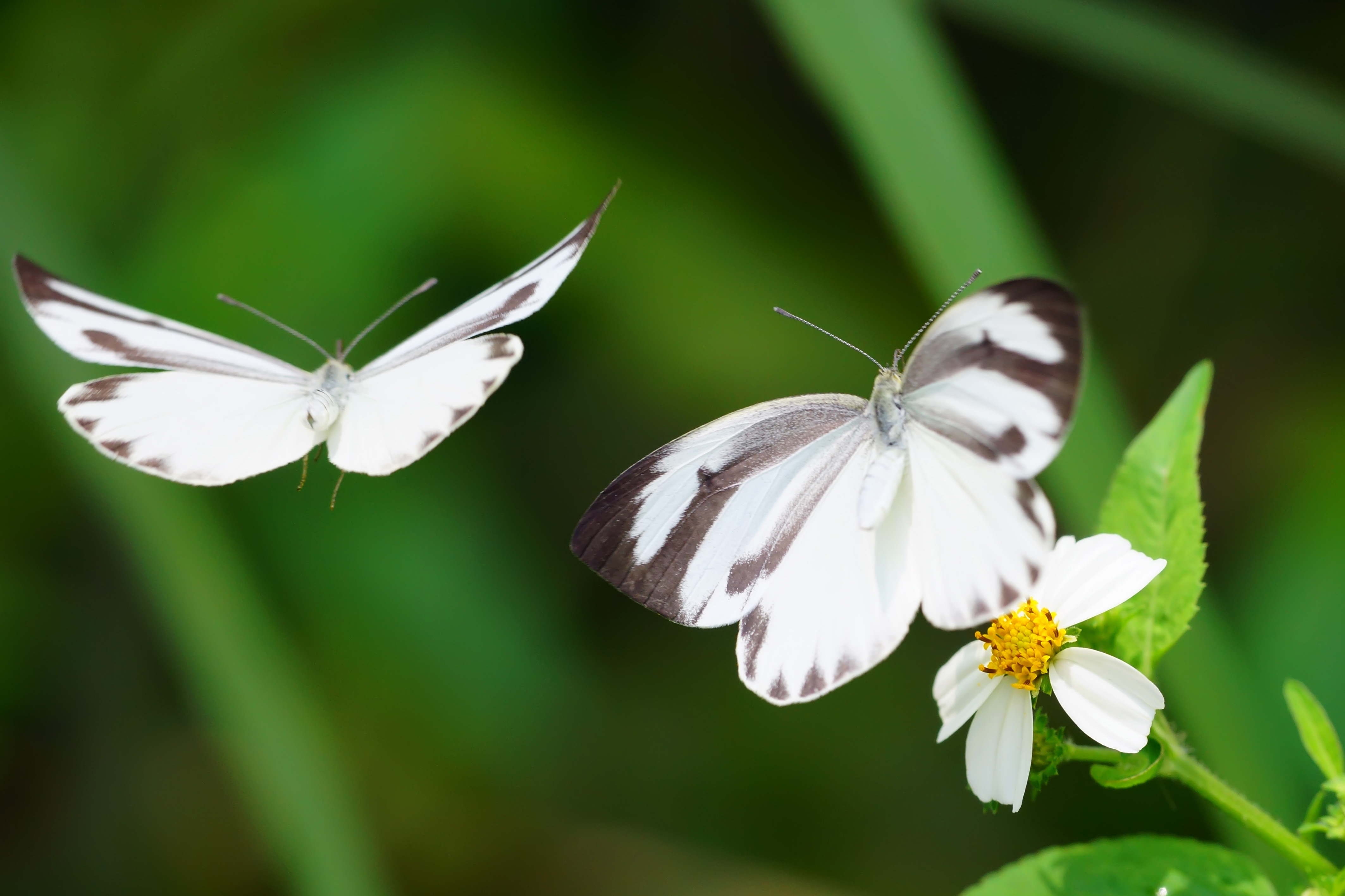 飛龍白粉蝶 Talbotia naganum karumii